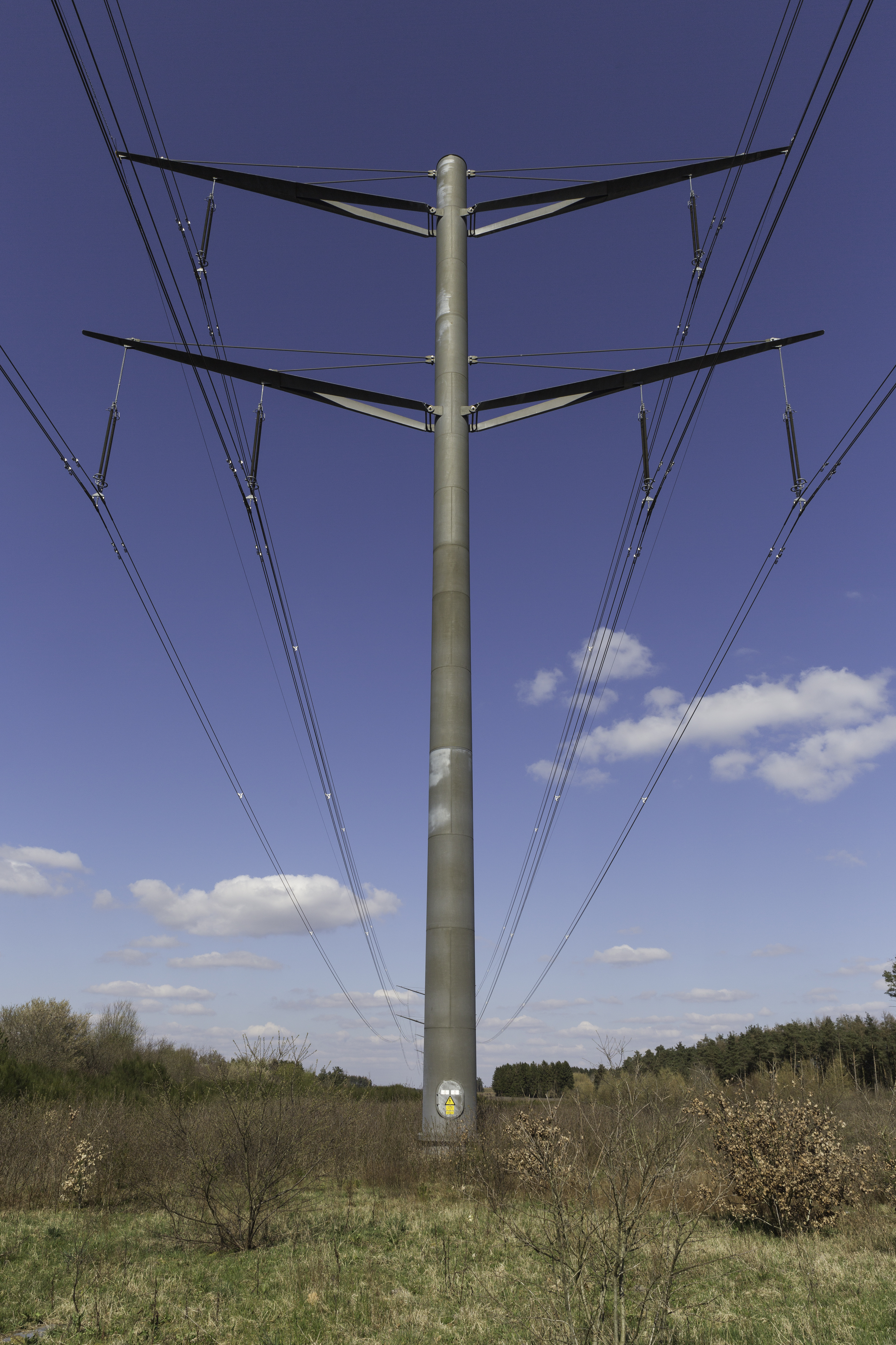 Højspændingsforbindelsen Kassø–Tjele på vejen mellem Ejstrupholm og Brande, mast 325